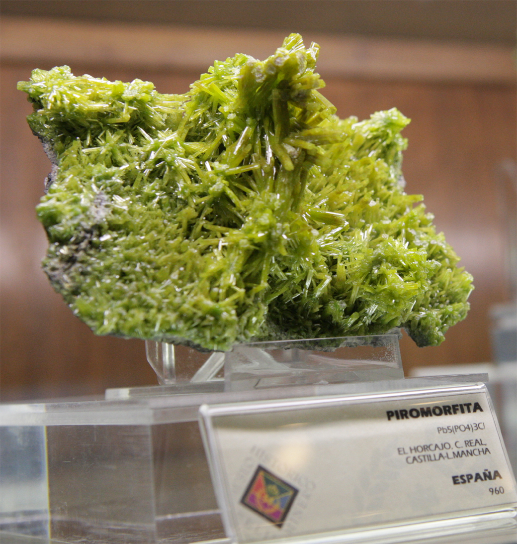 Ejemplar de piromorfita de las minas de El Horcajo, Almodóvar del Campo (Ciudad Real) perteneciente al Museo de la Escuela de Ingenieros de Minas de Madrid